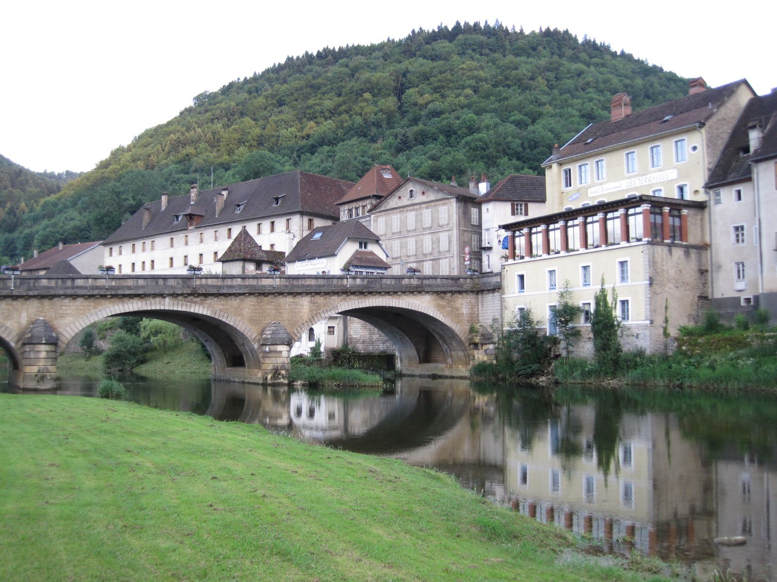 Saint-Hippolyte (Doubs)